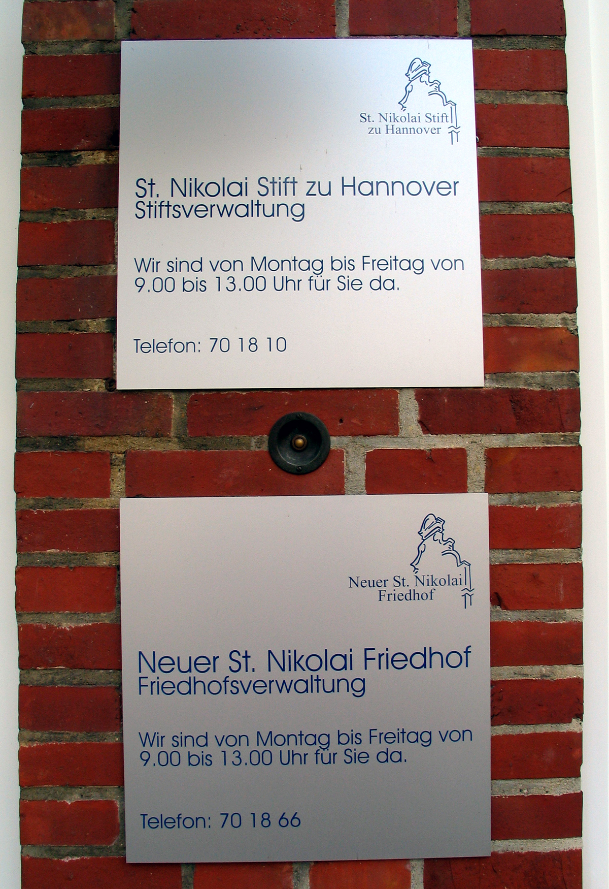 Infotafeln am Gebäude An der Strangriede 41 (in Hannover, Stadtteil Nordstadt) desSt. Nikolai Stifts zu Hannover mit Telefonnummern der Stiftsverwaltung und der Friedhofsverwaltung vom Neuen St. Nikolai Friedhofs